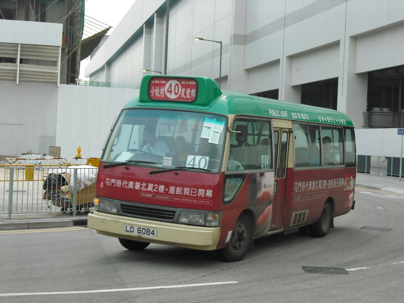 中文（香港）: 新界綠小40線，攝於屯門西鐵巴士總站。